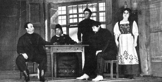 Escena de la obra de teatro La honra de los hombres, de Jacinto Benavente